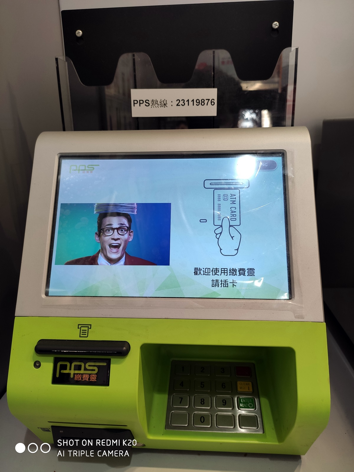 這是一幅由本人拍攝的照片